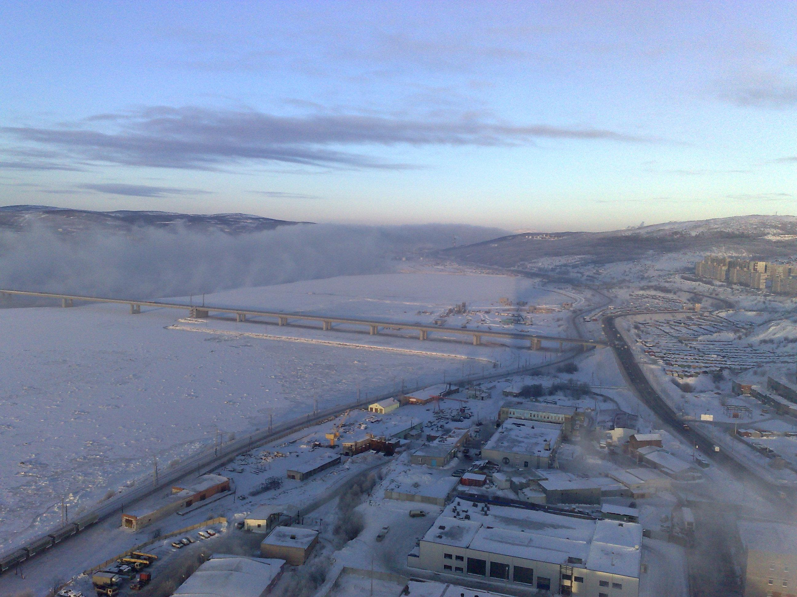 Мост через Кольский залив